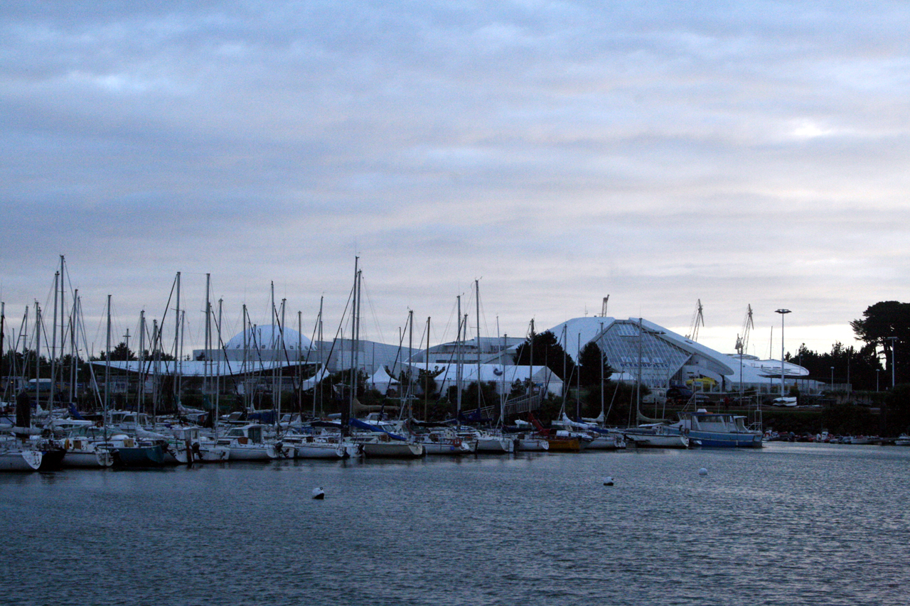 Aquarium Oceanopolis à Brest